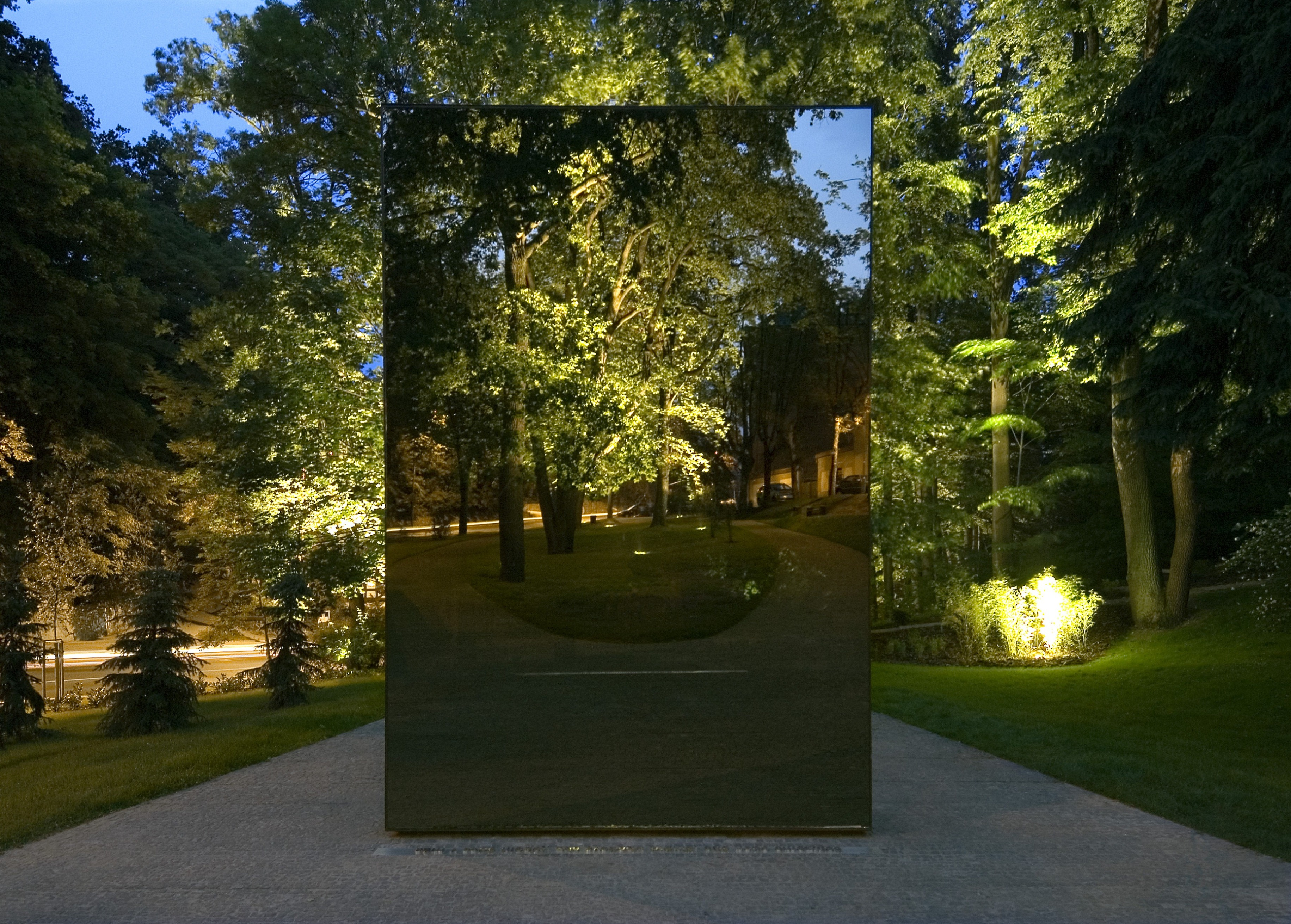 Památník obětem komunismu v Liberci, ateliér sporadical